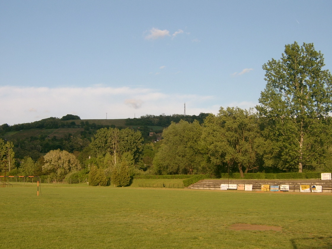 Tabi sportpálya